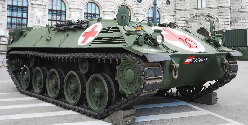 Schützenpanzer des österreichischen Bundesheeres als Sanitätspanzer (Saurer - Steyr)